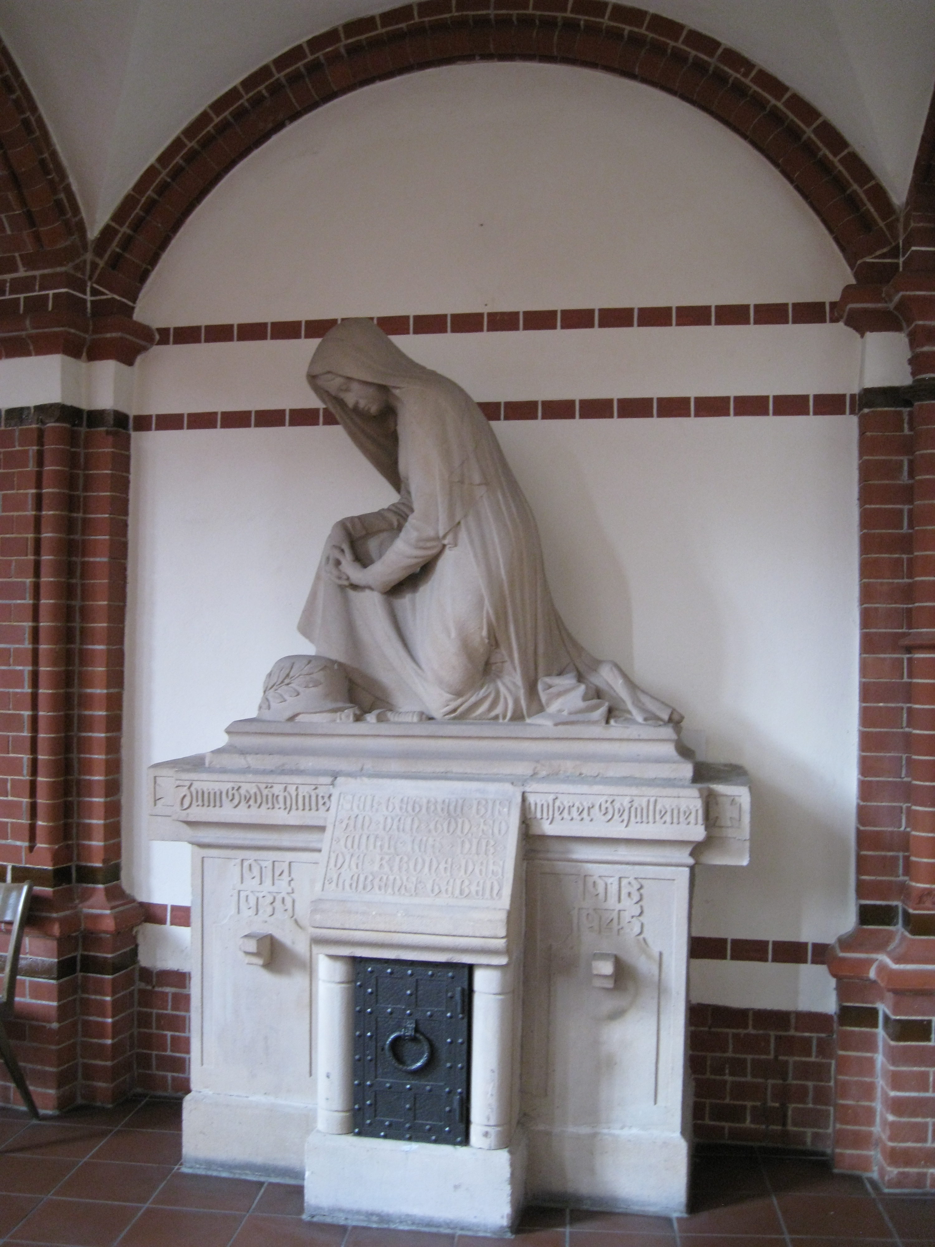 Ehrenmal von Heinrich Missfeldt in der Kirche Zum Guten Hirten, Berlin-Friedenau